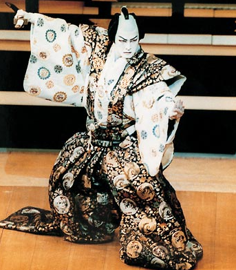 Lakonan Kabuki